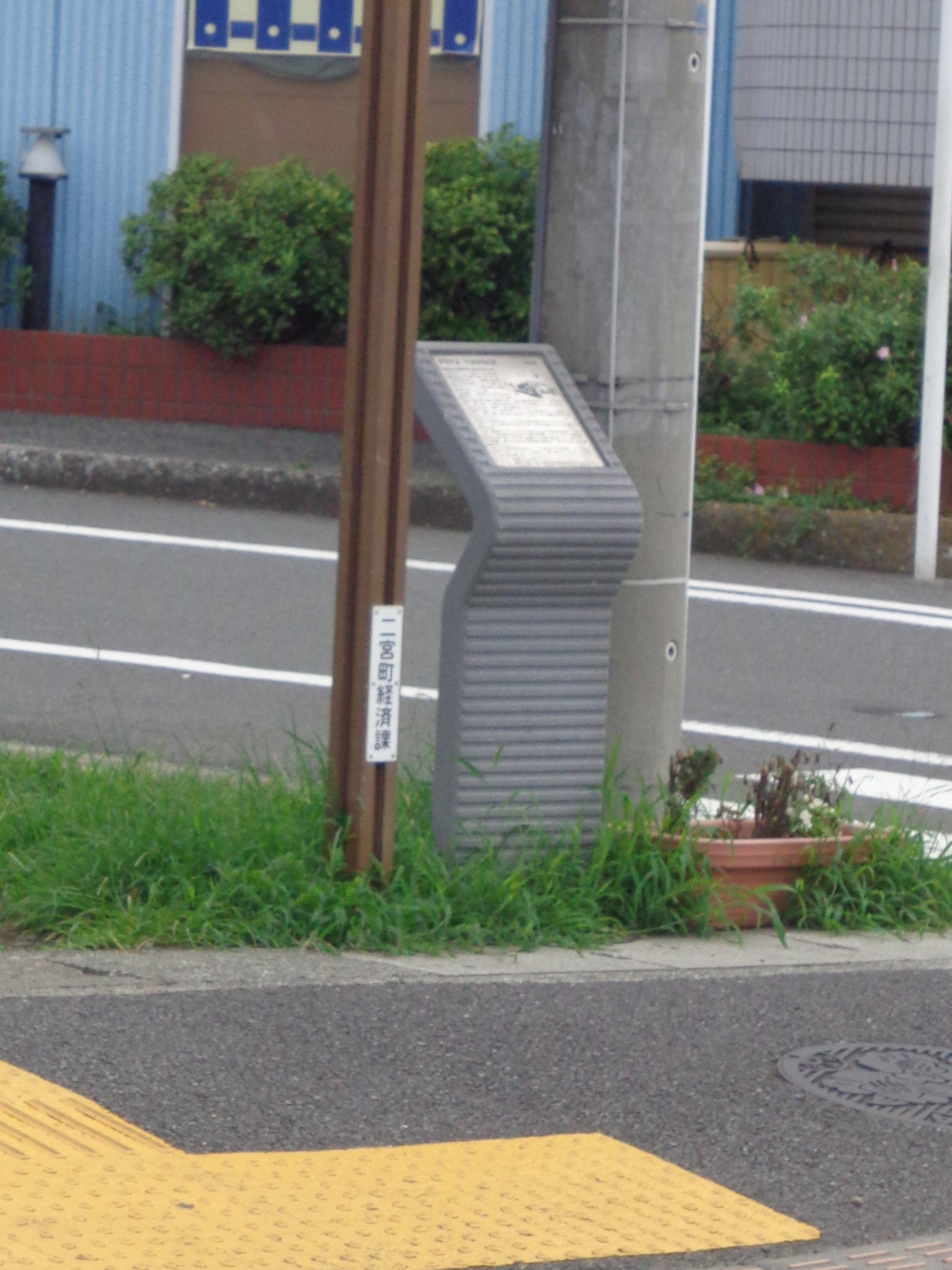 湘南軌道中里駅跡